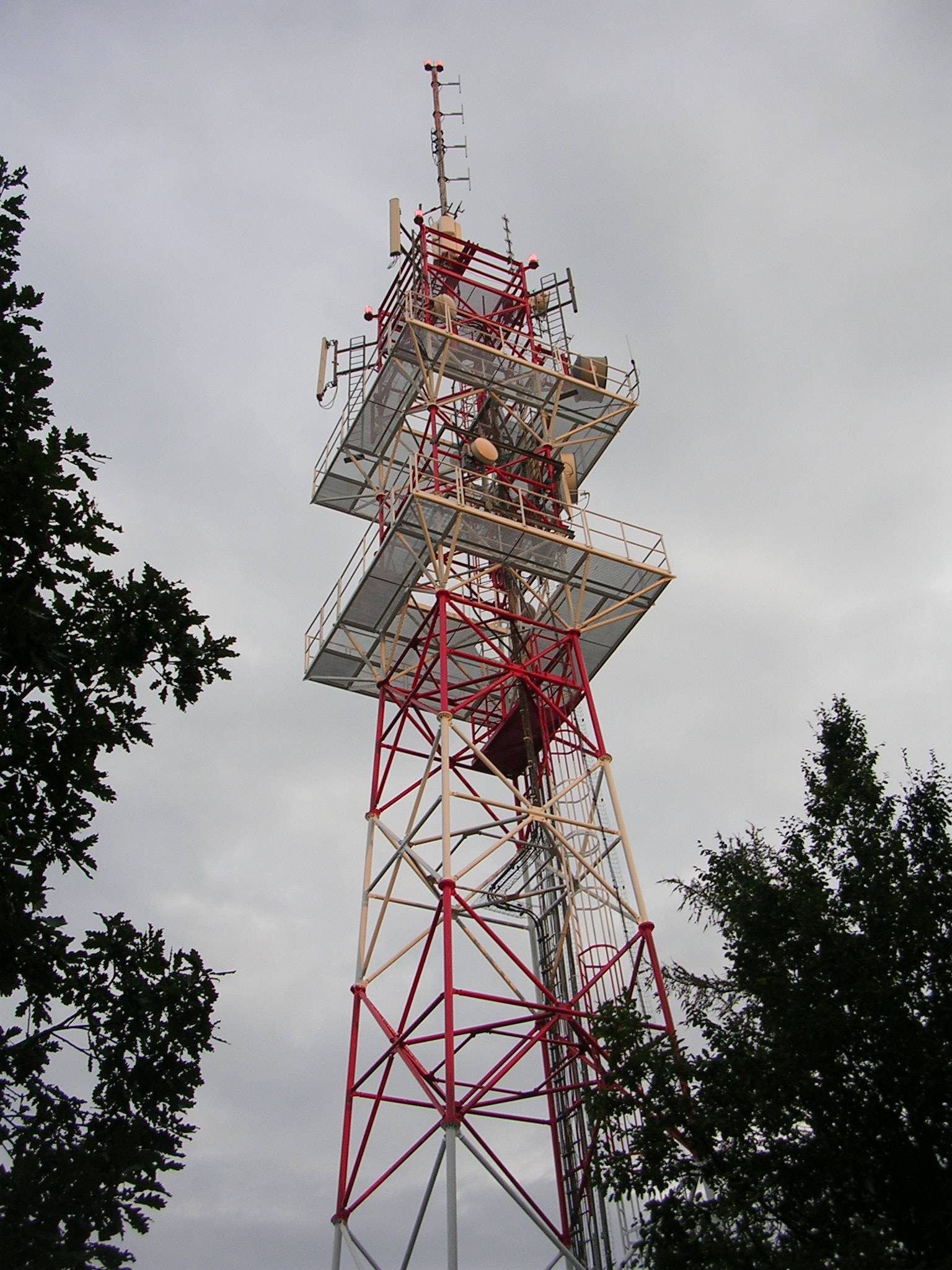 Praha-Ďáblice, Ládví - telekomunikační věž